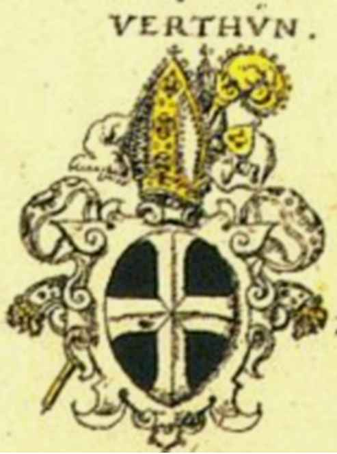 Wappen des Bistums Verdun nach Siebmachers Wappenbuch